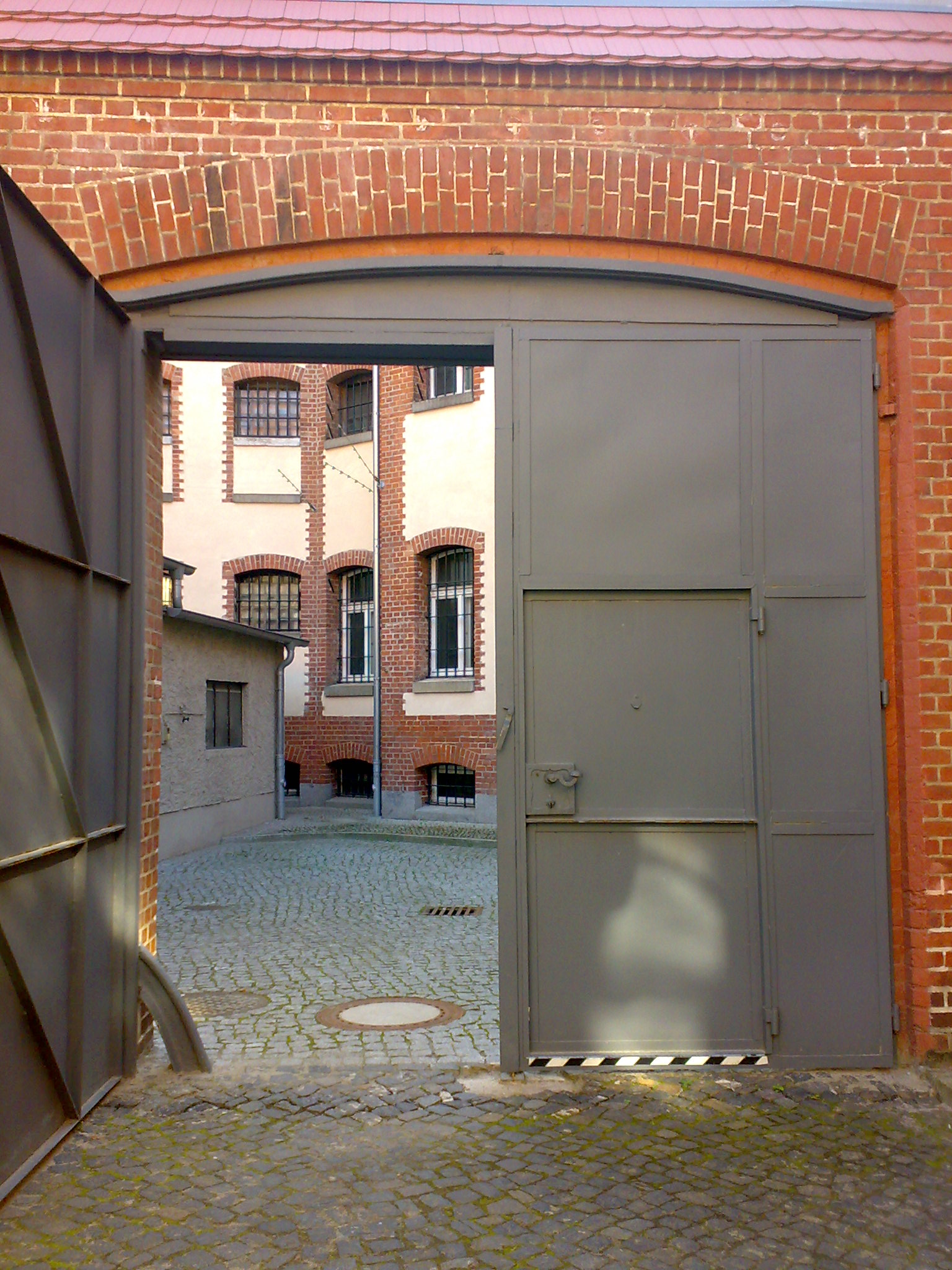 Die heutige Gedenkstätte Lindenstraße 54/55 in Potsdam (das sogenannte "Lindenhotel"), war in der Geschichte Gerichtsgebäude, Sitz eines NS-Erbgesundheitsgerichtes und in der Zeit des Nationalsozialismus, der sowjetischen Bestzungszeit und der DDR Untersuchungsgefängnis (ab 1953 der Stasi). Das Bild zeigt den Gefängnishof